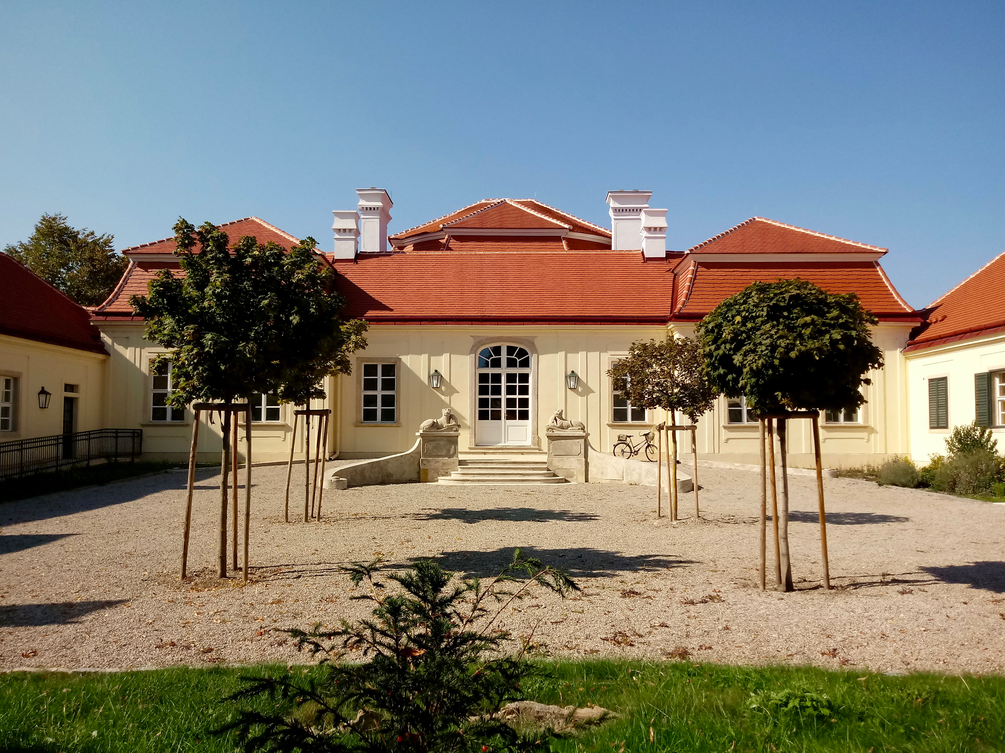 Ehem. Grünne Haus (Grünes Haus)